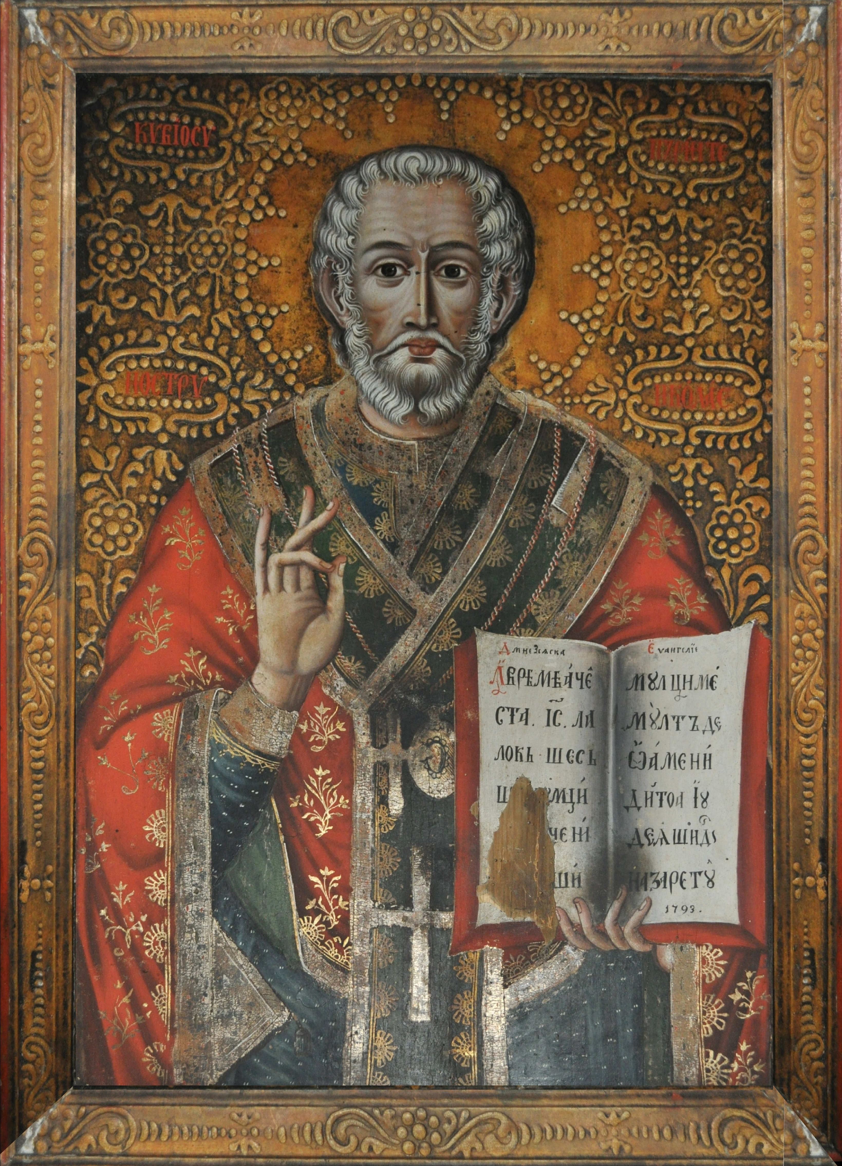 Biserica de lemn din Sartăș